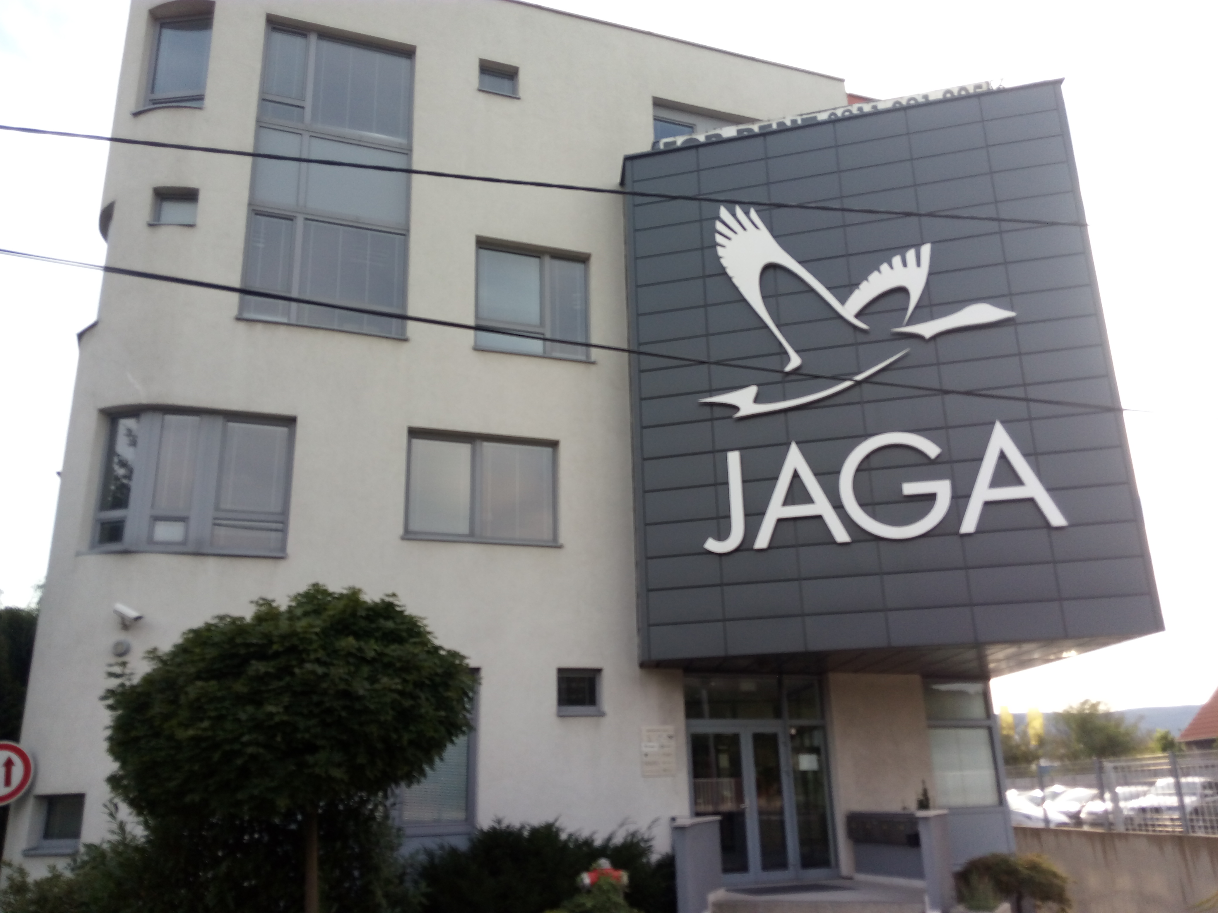 Lamačská cesta 45, Lamač, Bratislava